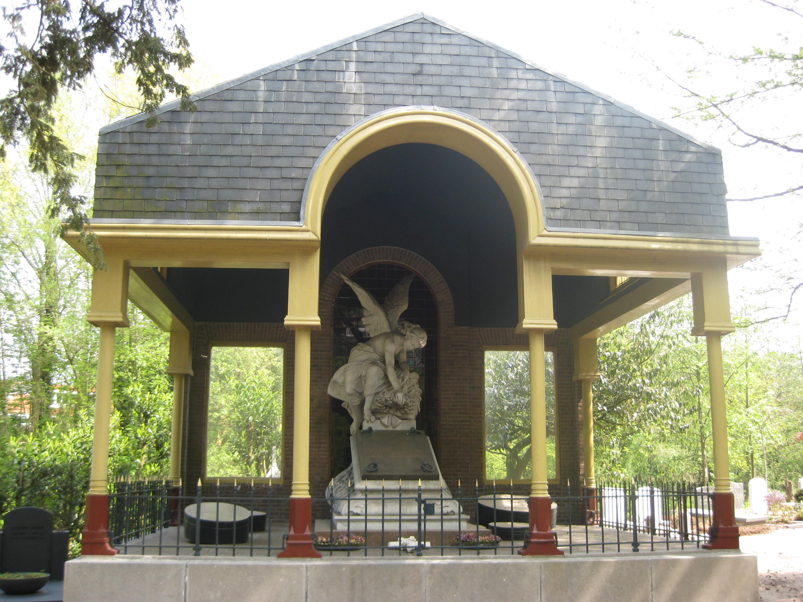 Grafmonument van familie Dorrepaal uit 1886, beeld ontworpen door F.Stracké, op Zorgvlied, begraafplaats in Amsterdam